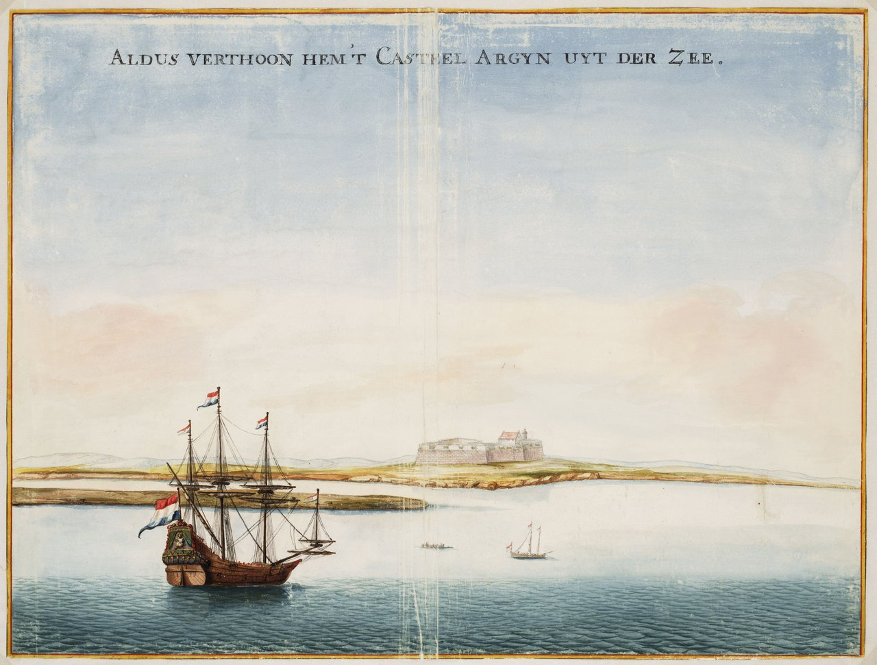 "Aldus verthoon hem 't casteel Argijn uyt der zee" Gezicht op Casteel Argijn/Cape d'Arguin vanuit zee, Senegal